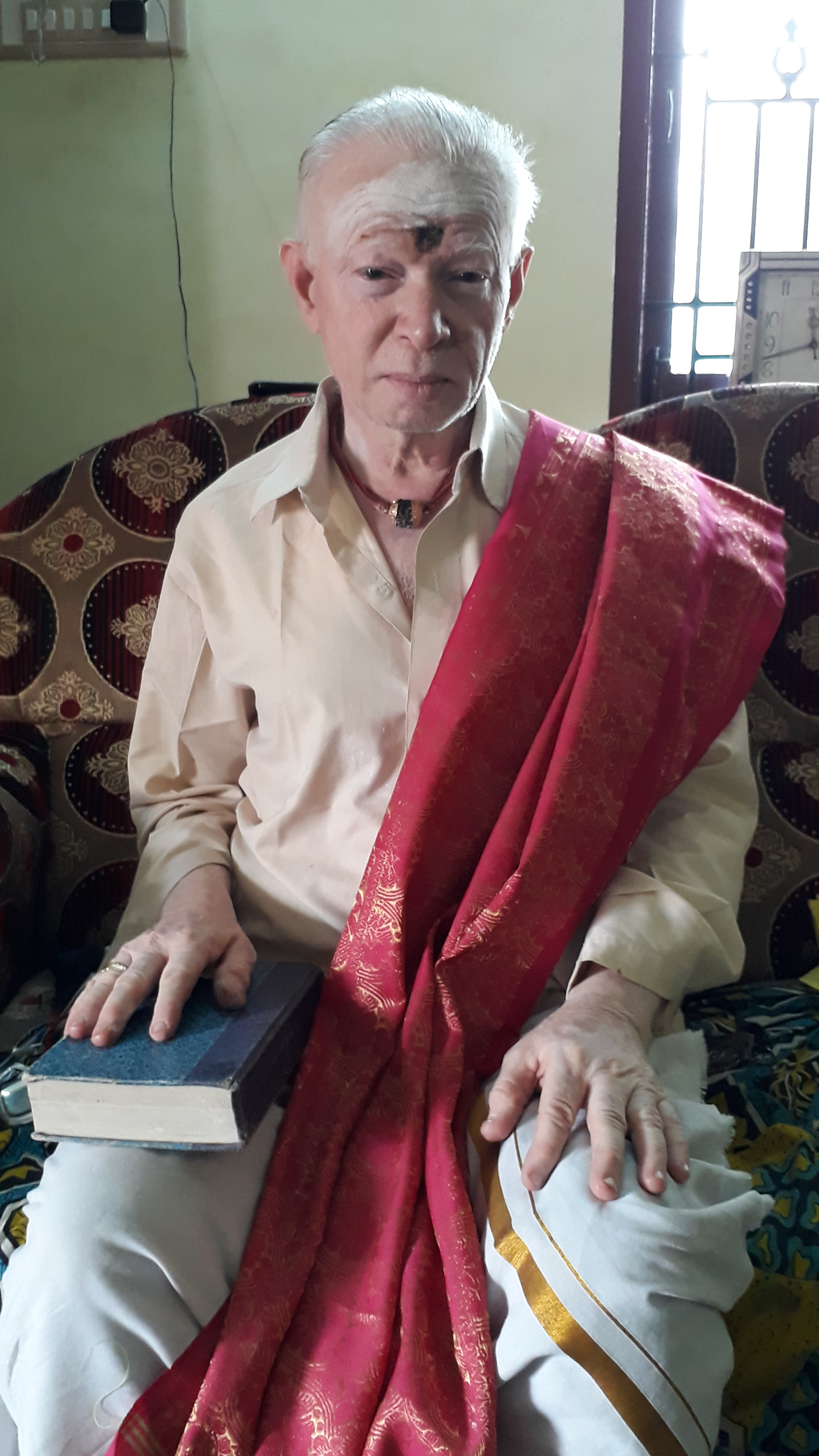 S.RAMALINGAM(SEEGAMPATTIYAR)